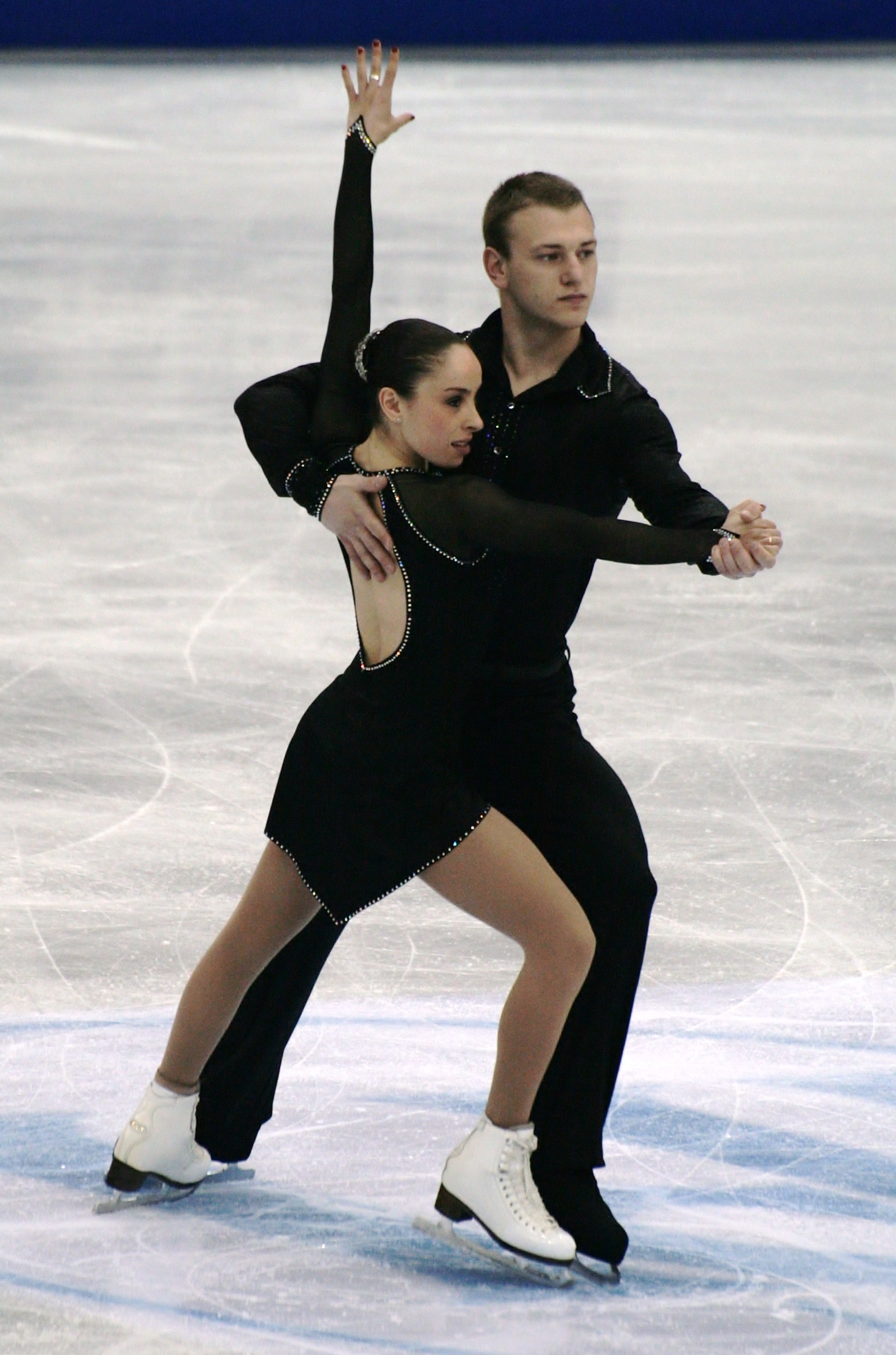 Даниэль Монтальбано и Евгений Краснопольский на чемпионате мира по фигурному катанию 2012